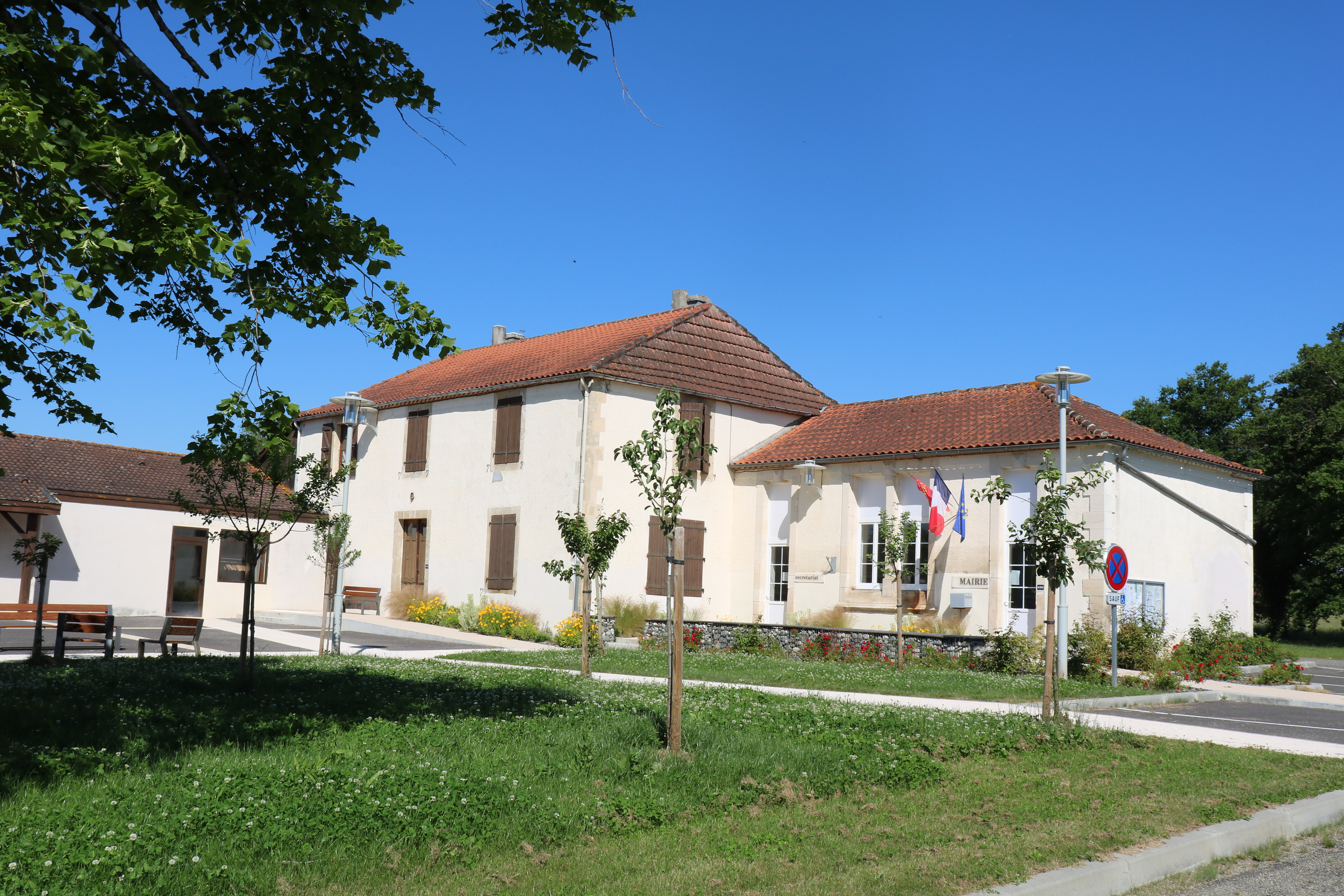 Mairie de la commune de Saint-Aunix-Lengros dans le Gers (32) France